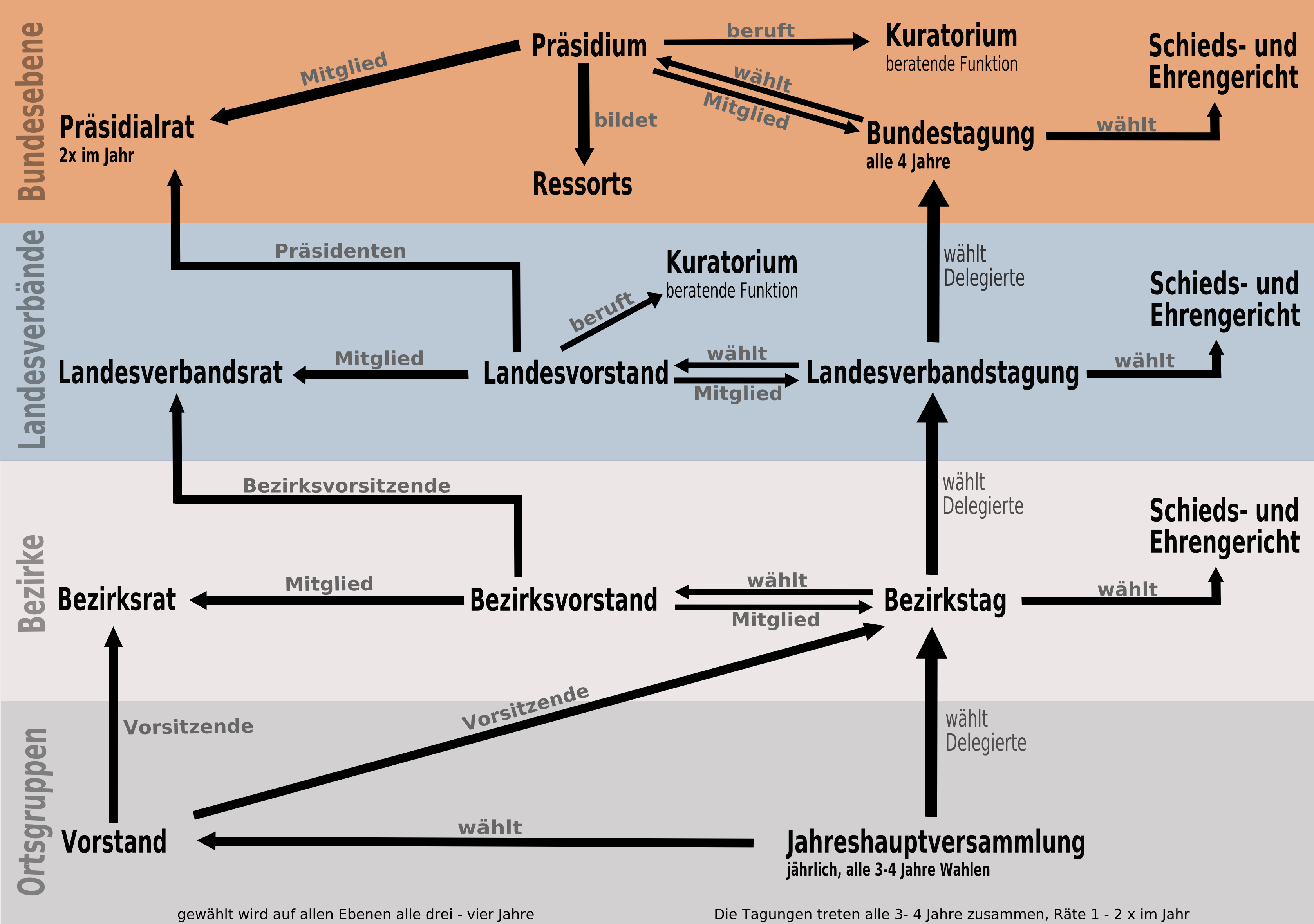 Organisatorischer Aufbau der DLRG